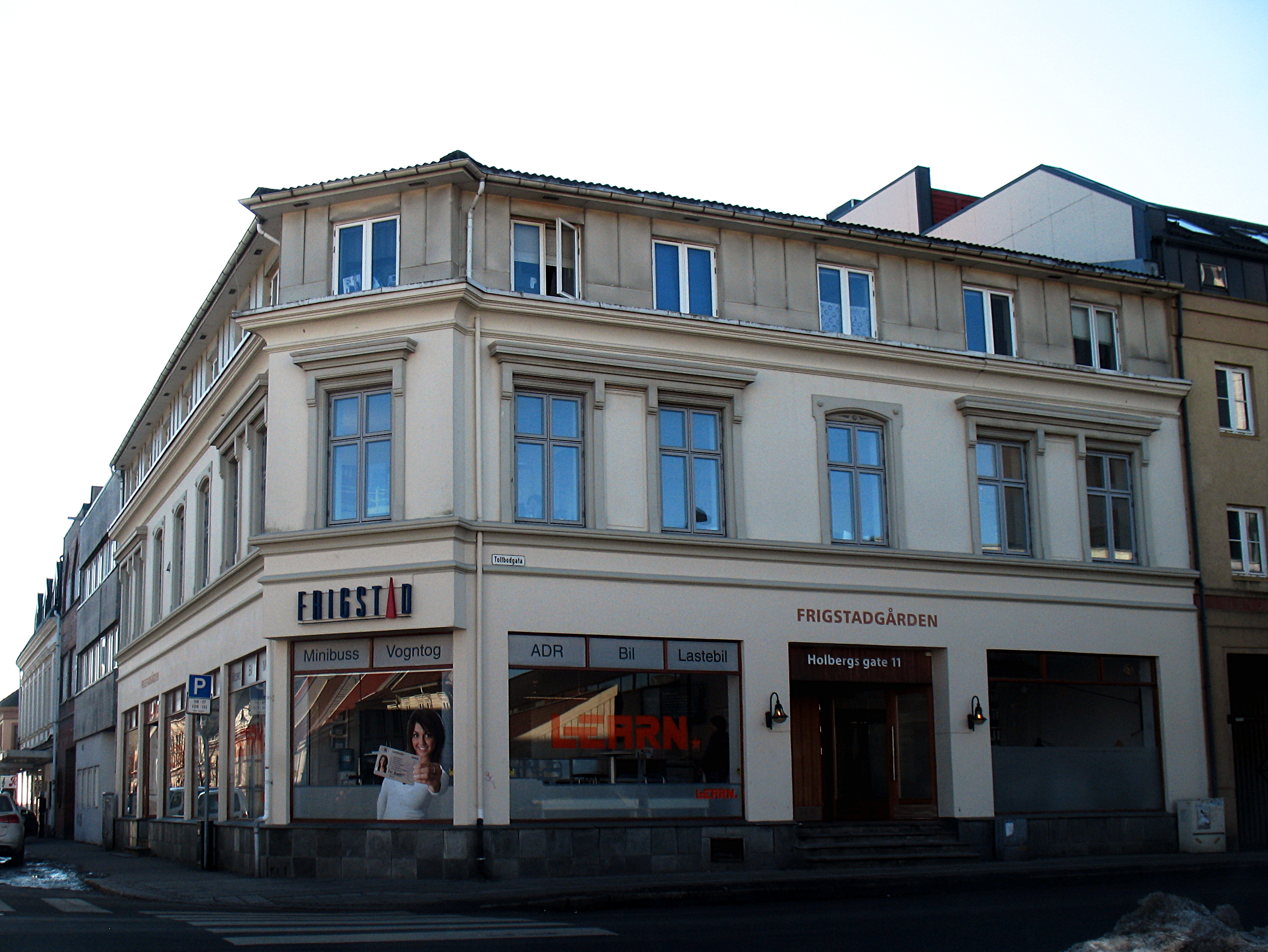 Frigstadgården i Holbergs gate 11 på hjørnet av Tollbodgata i bydelen Kvadraturen / Eg i Kristiansand.